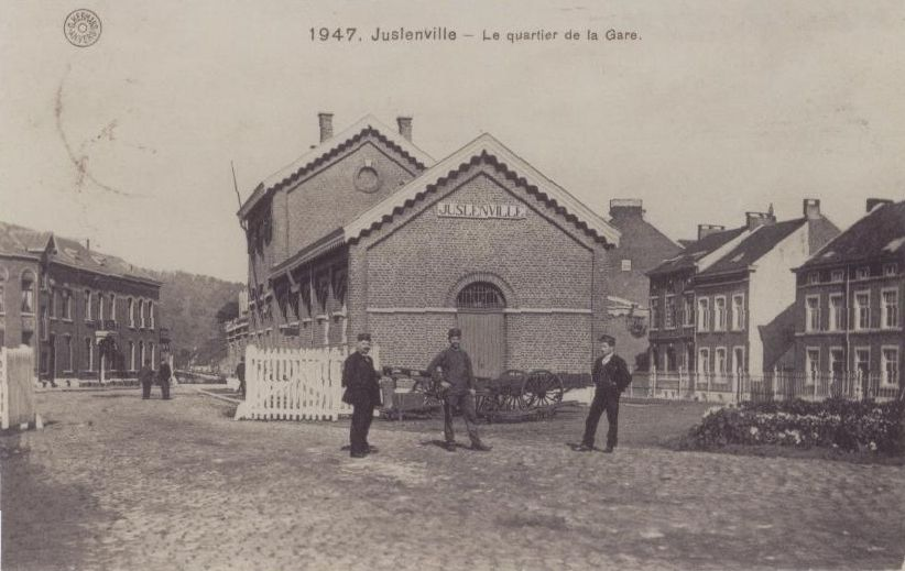 Gare Juslenville 1911